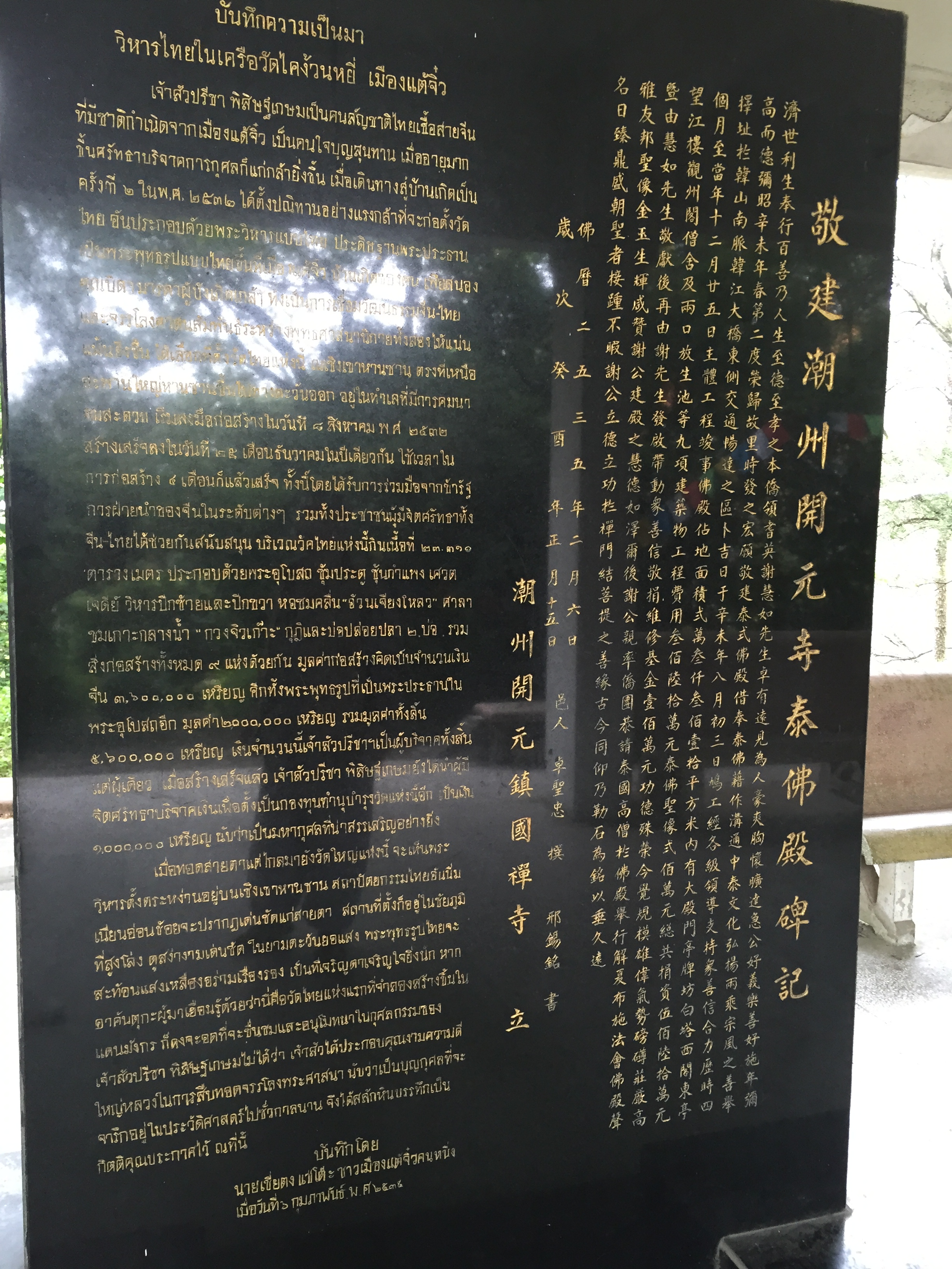 บันทึกความเป็นมา วิหารไทยในเครือวัดไคง้วนหยี่ เมืองแต้จิ๋ว